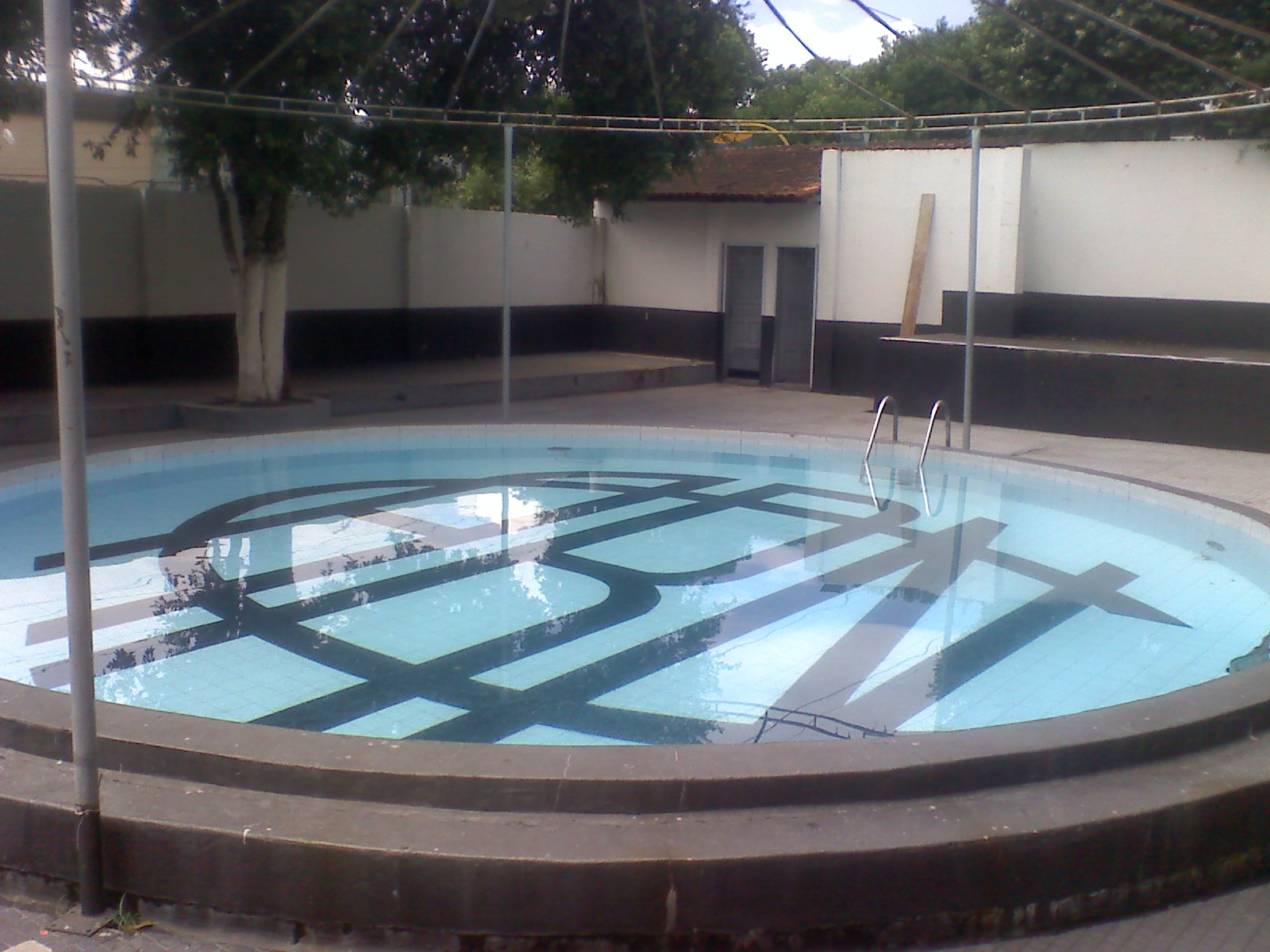 Acônimo do Rio Negro, clube manauara, na piscina de hidro nas sóciais do clube.